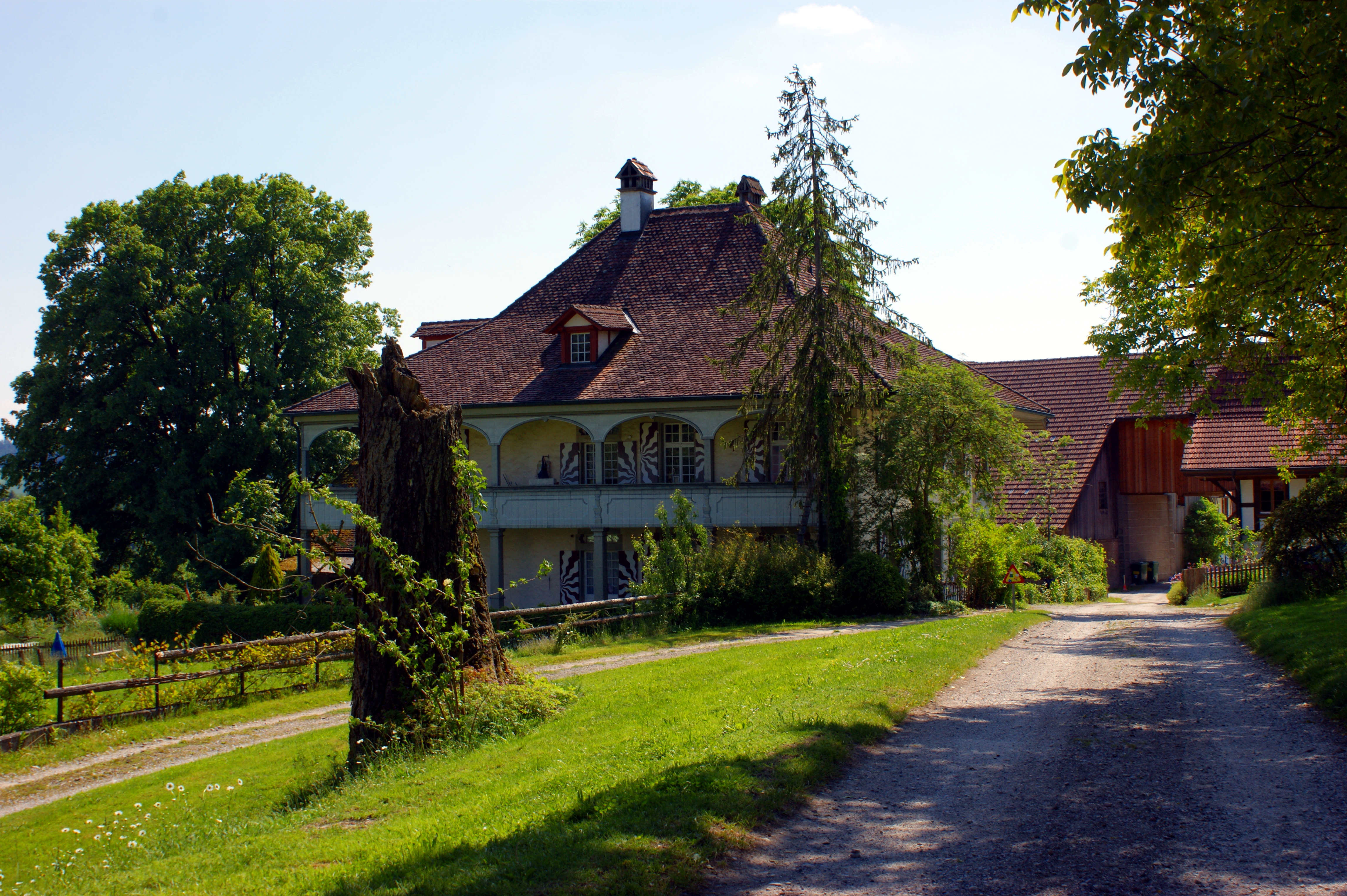 Wohnstock Riedern mit Baumstrunk, Riedernstrasse 42, Bern